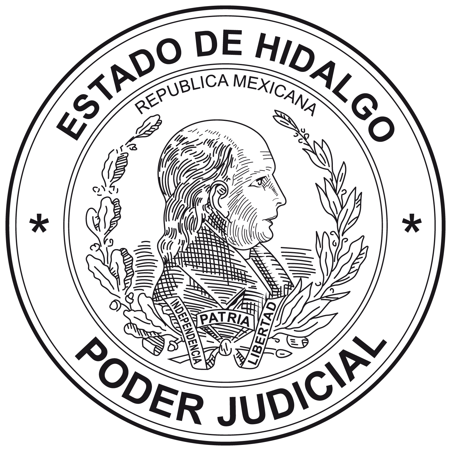 Logo Poder Judicial de Hidalgo